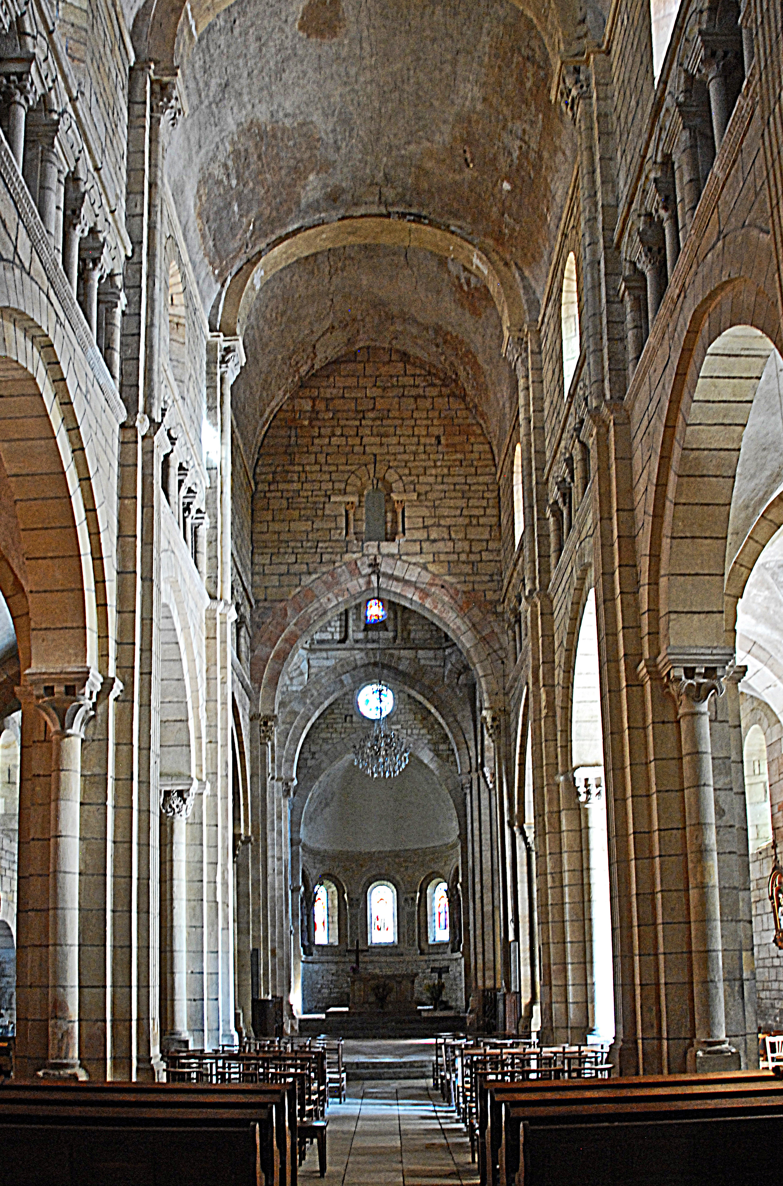 St-Hilaire de Semur-en-Brionnais, Mittelschiff zum Chor